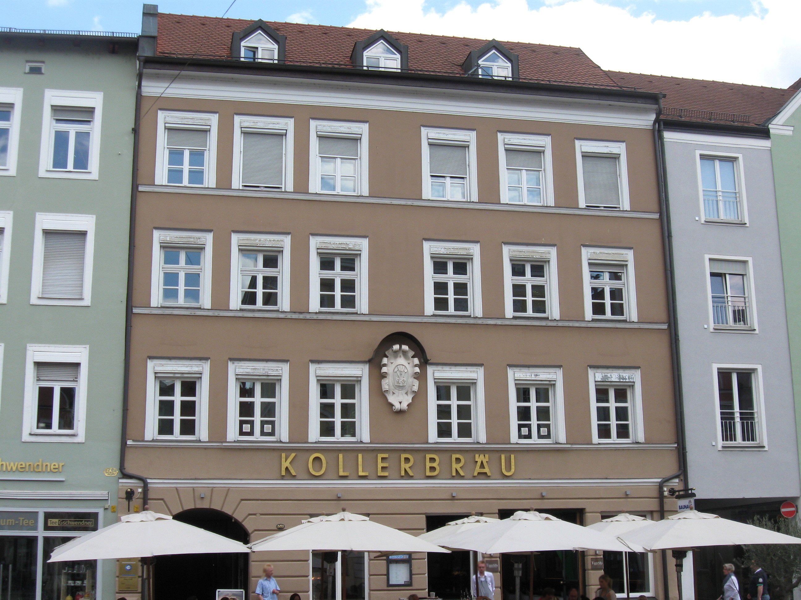 Altstadt 362/363; Gasthof Kollerbräu Gasthof Kollerbräu, viergeschossiger Bau zu sechs Obergeschossachsen, traufständig, durchgreifender Umbau 1881. D-2-61-000-121